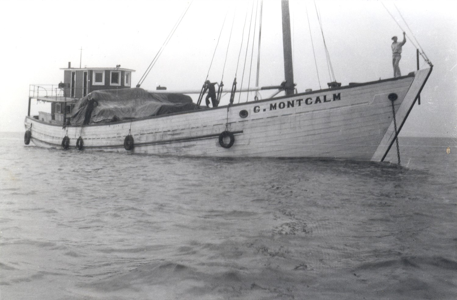 Goélette G.Montcalm du capt Joseph Desgagnés, de Saint-Joseph-de-la-Rive, construite en 1939